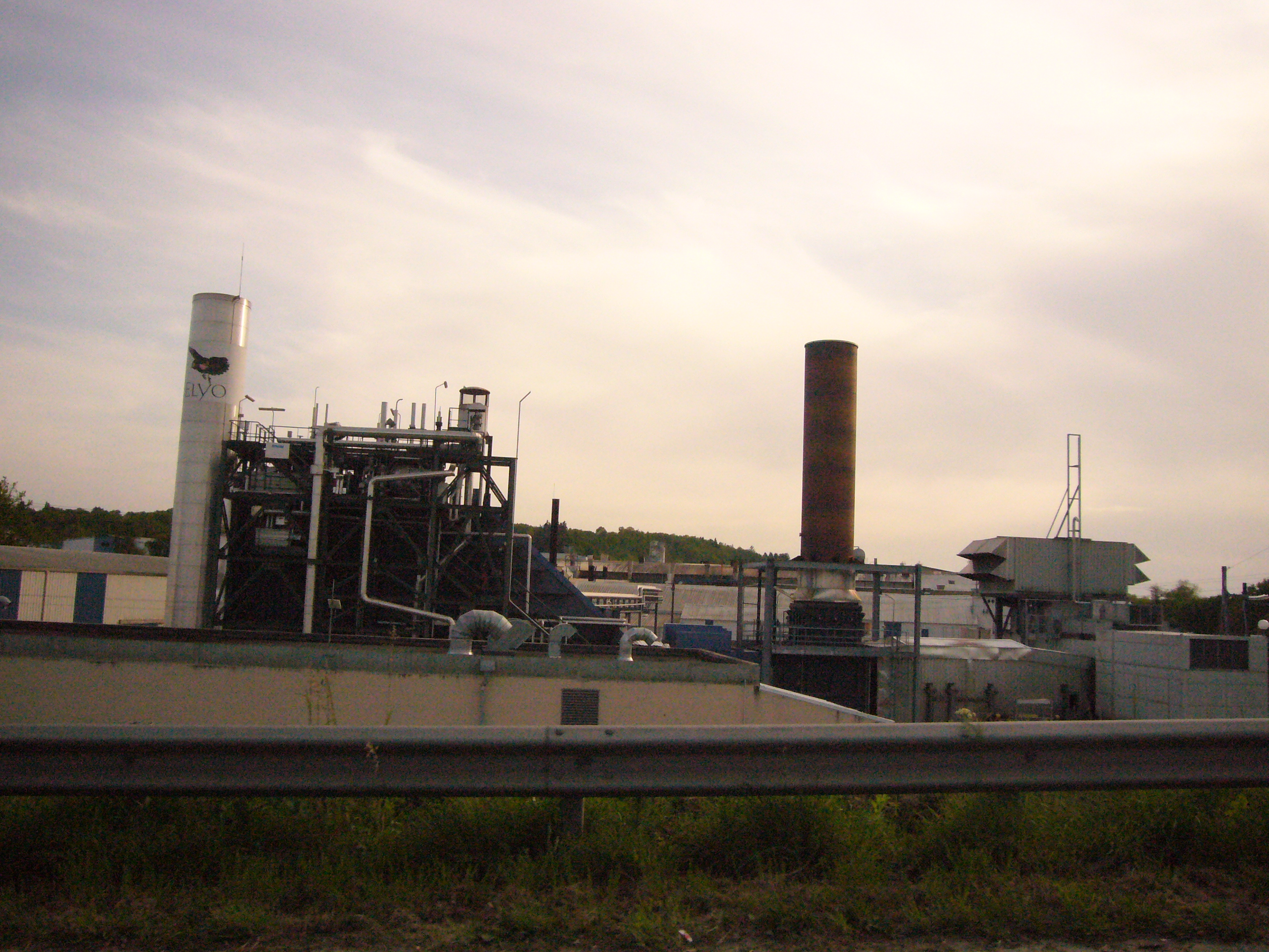 Partie des usines International Paper de Saillat-sur-Vienne, Haute-VIenne, France